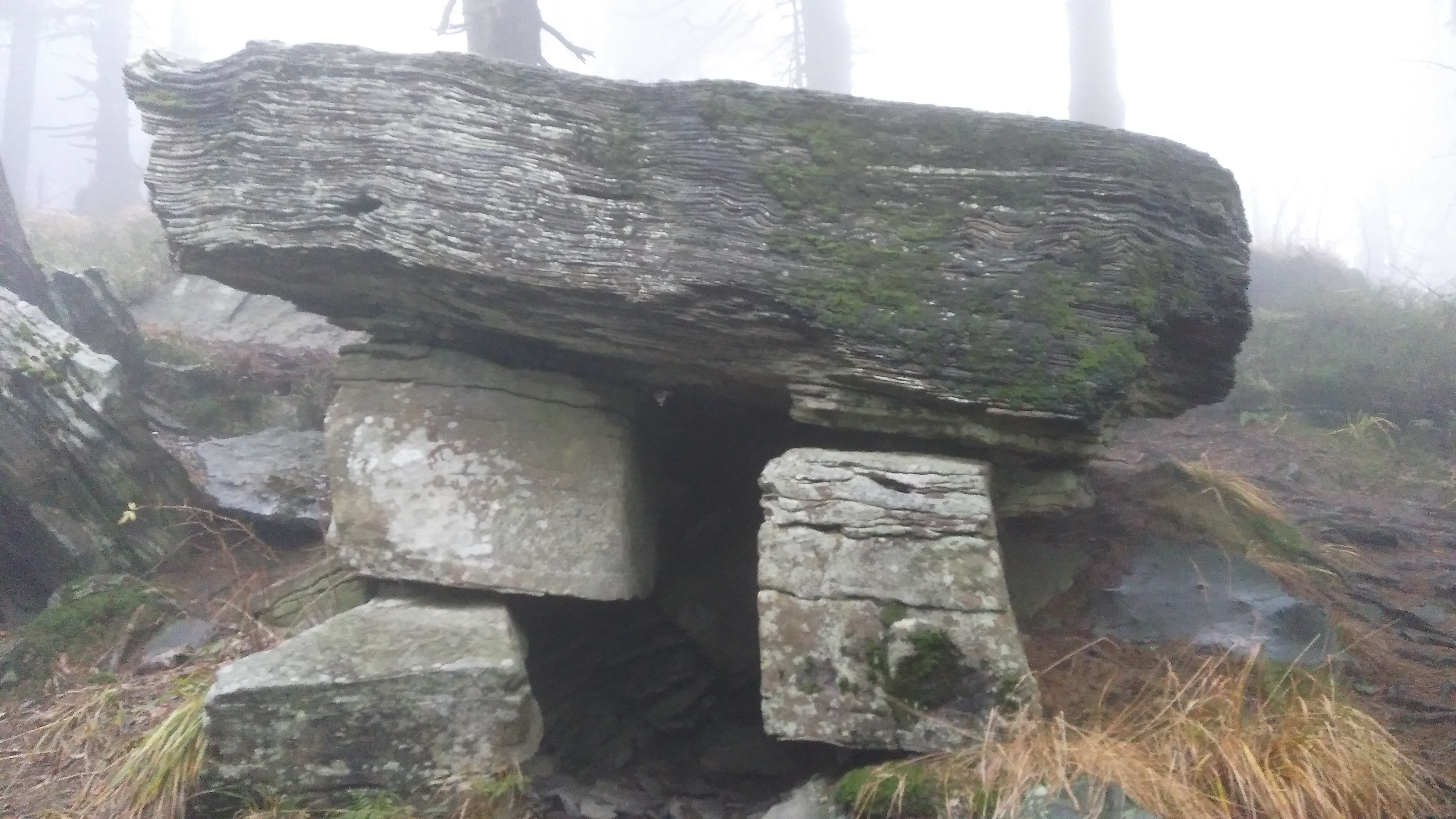 Čertův stůl - pseudokrasový útvar na Čertově mlýně